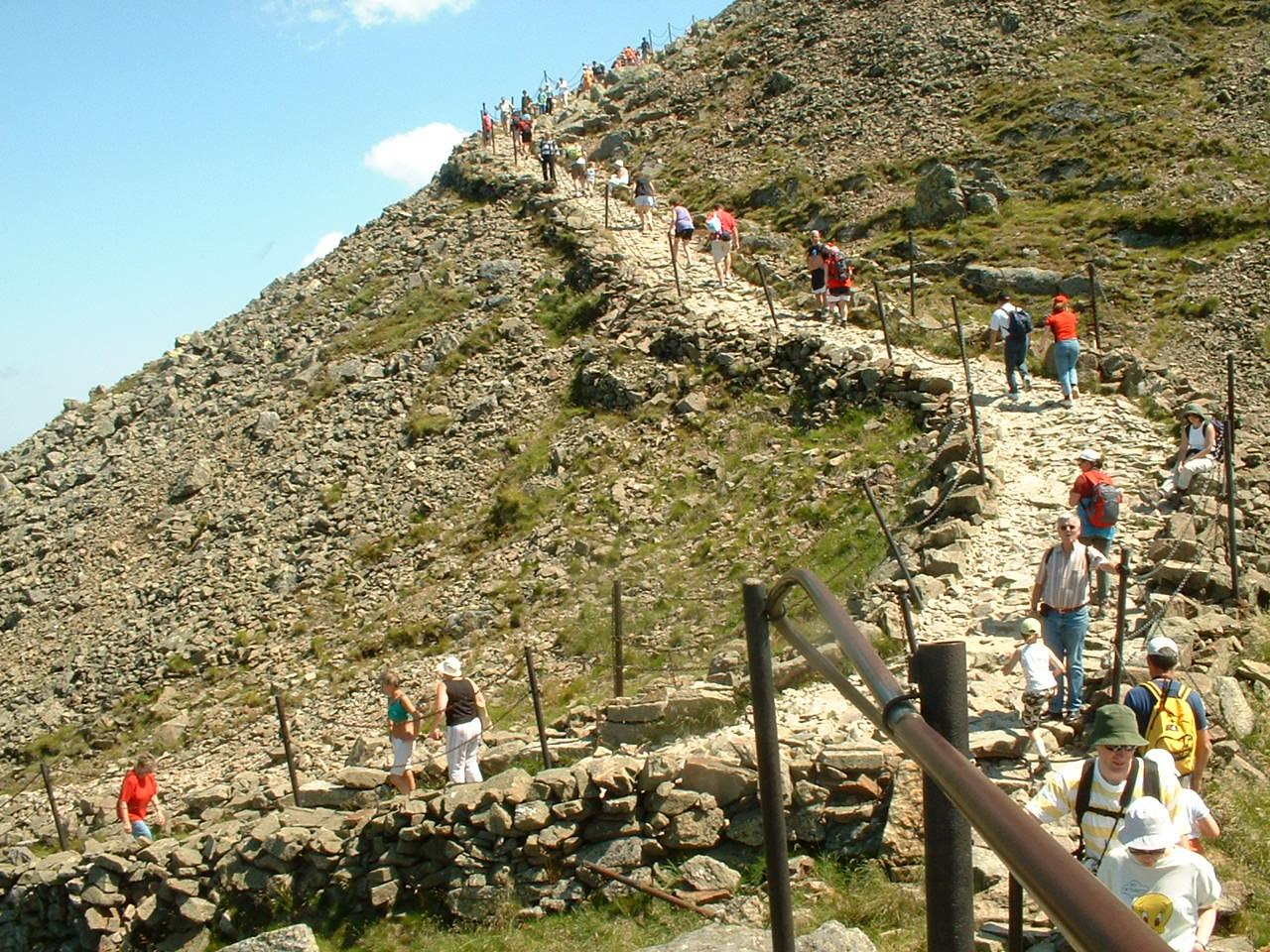 Der steinige Weg hinauf zur Schneekoppe.